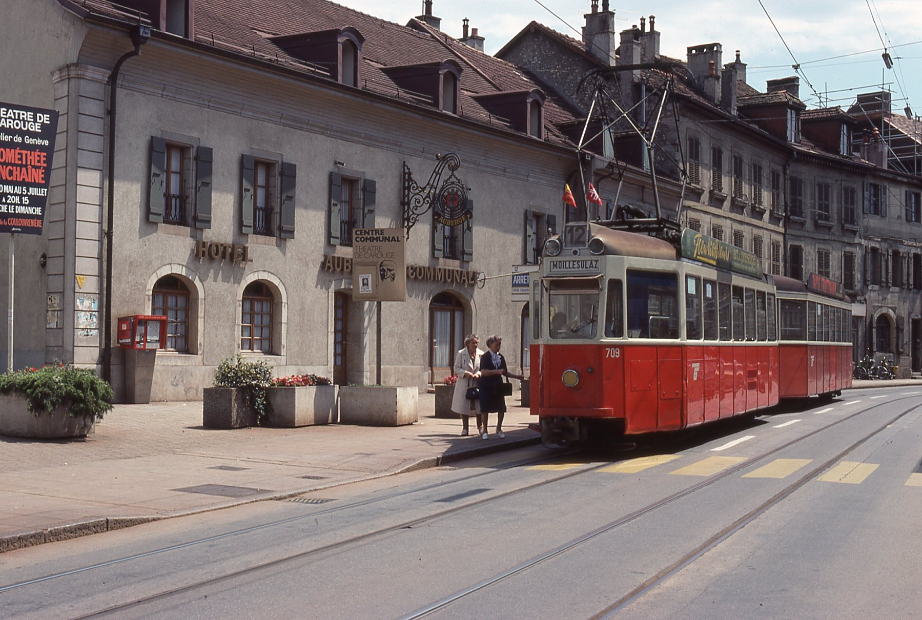 Photo: Trams aux Fils. Prise en juin 1978 Rue Ancienne